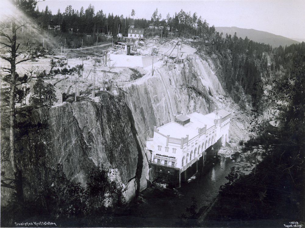 Гидроэлектростанция у водопада Свельгфос, Нутодден, Норвегия